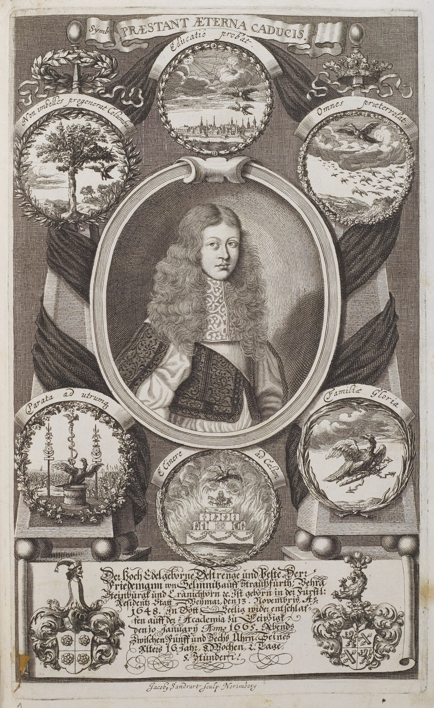 Grafik aus dem Klebeband Nr. 2 der Fürstlich Waldeckschen Hofbibliothek Arolsen Motiv: Friedemann von Selmnitz (1648–1665), Sohn des Ratsherrn Ernst Friedemann von Selmnitz GND: 124442455